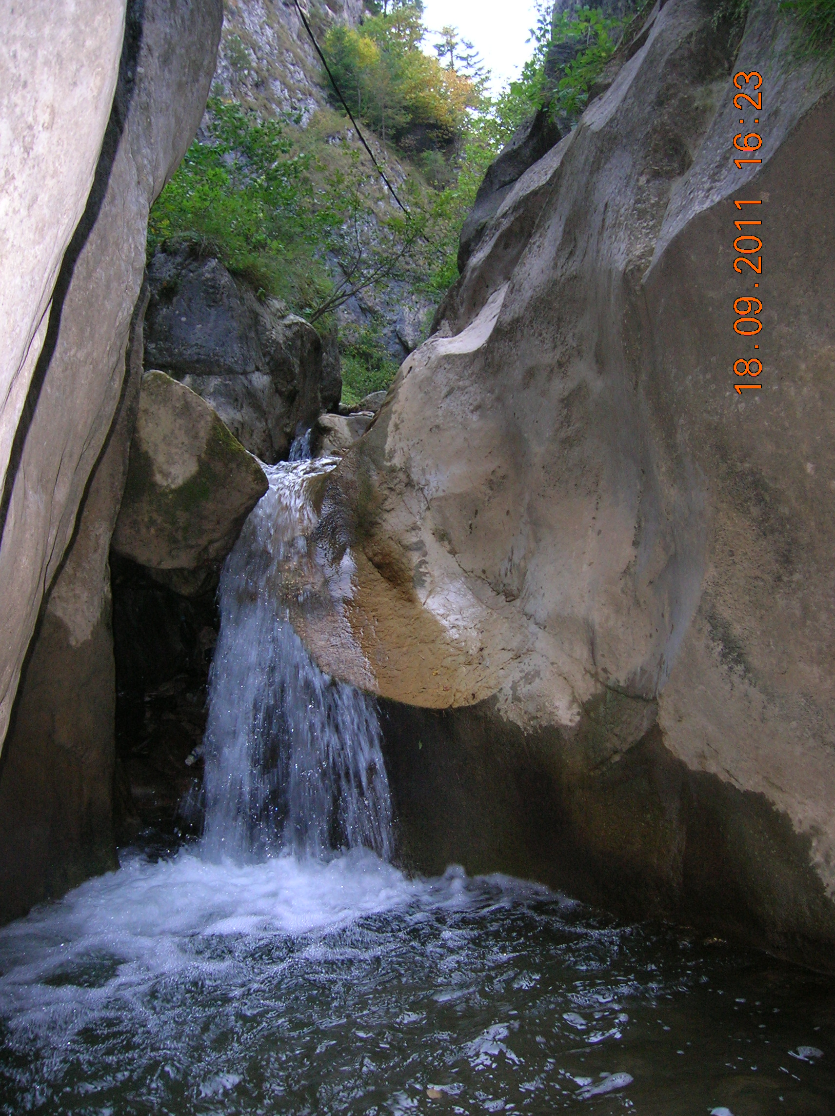 Cheile Şugăului, Rezervaţia Cheile Şugăului-Munticelu, Parcul Naţional Cheile Bicazului-Hăşmaş, Judeţul Neamţ, România